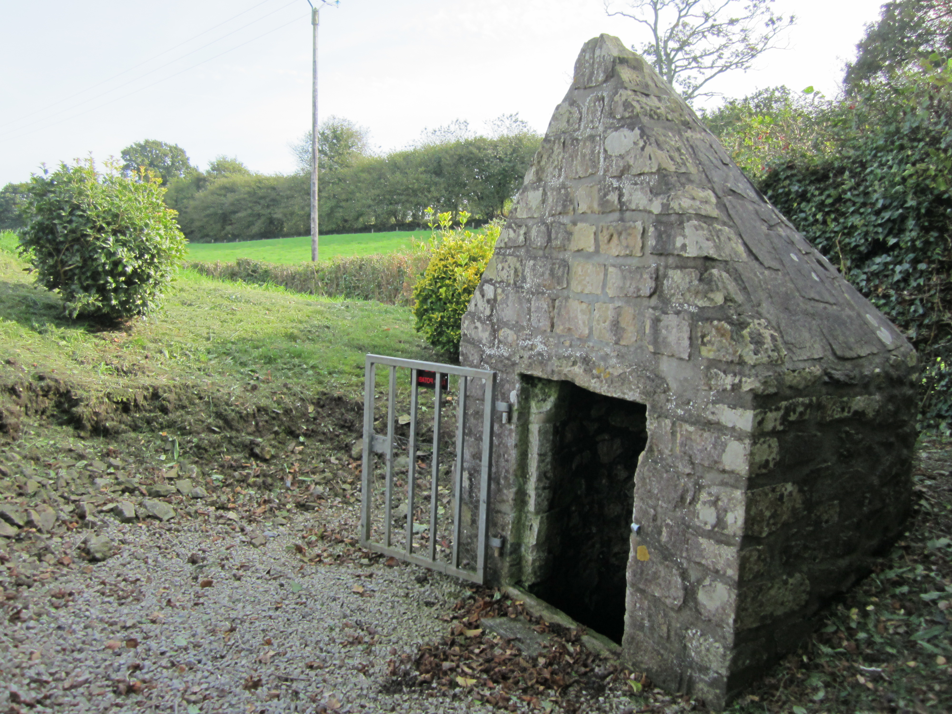 Ancteville, Manche